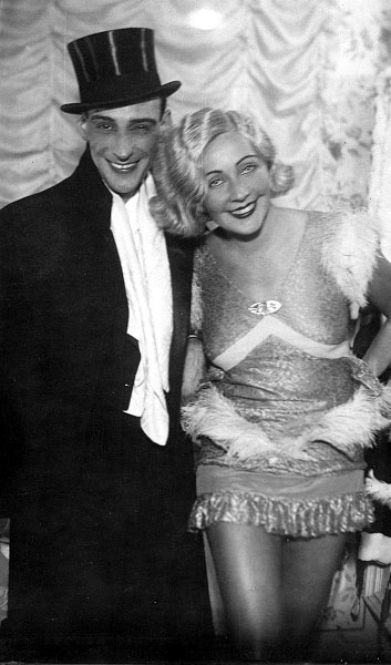 Fényes Szabolcs: Manolita. Fővárosi Operettszínház. Latabár Kálmán (Matolcsy Miklós) és Szokolay Olly (Otty Ottilia).